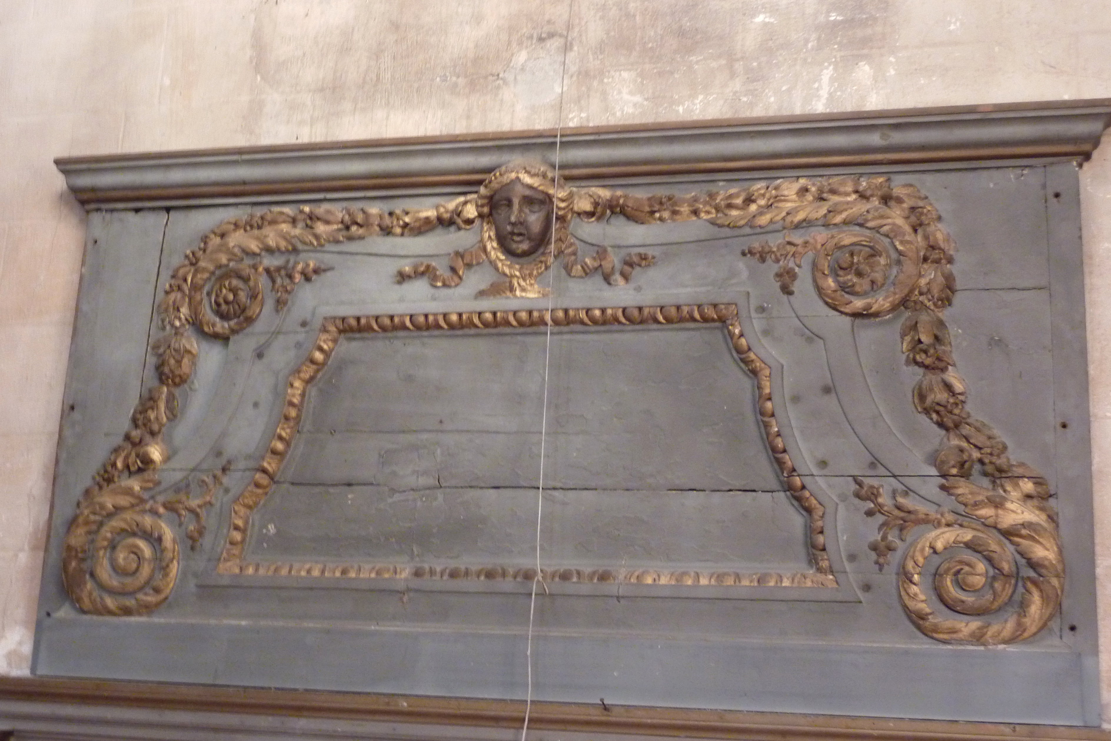 Katholische Pfarrkirche Saint-Corneille in Chartrettes im Département Seine-et-Marne in der Region Île-de-France (Frankreich), Holztäfelung aus dem 18. Jahrhundert